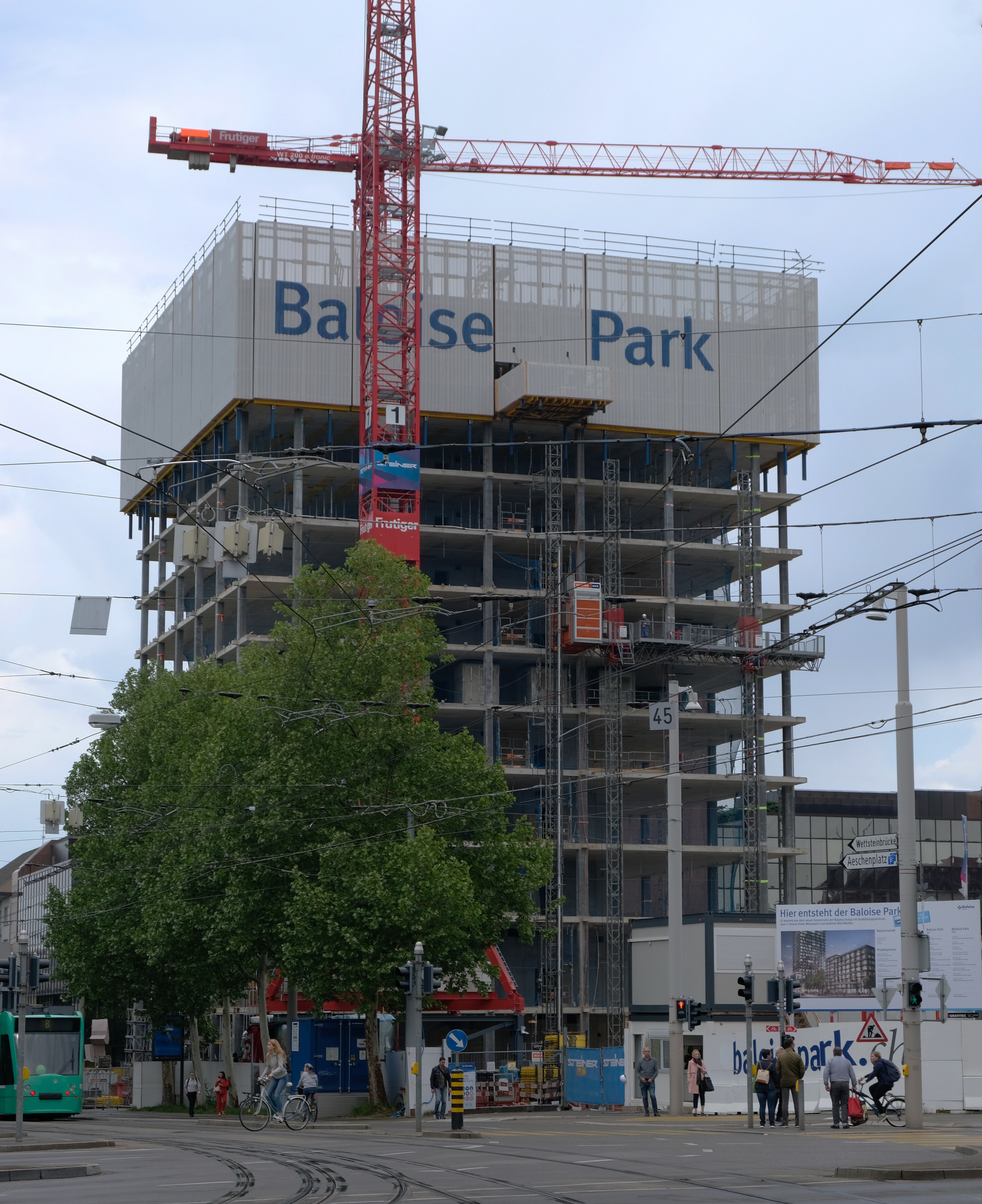 Basel: Baloise Hochhaus, Baufortschritt am 9. Mai 2018